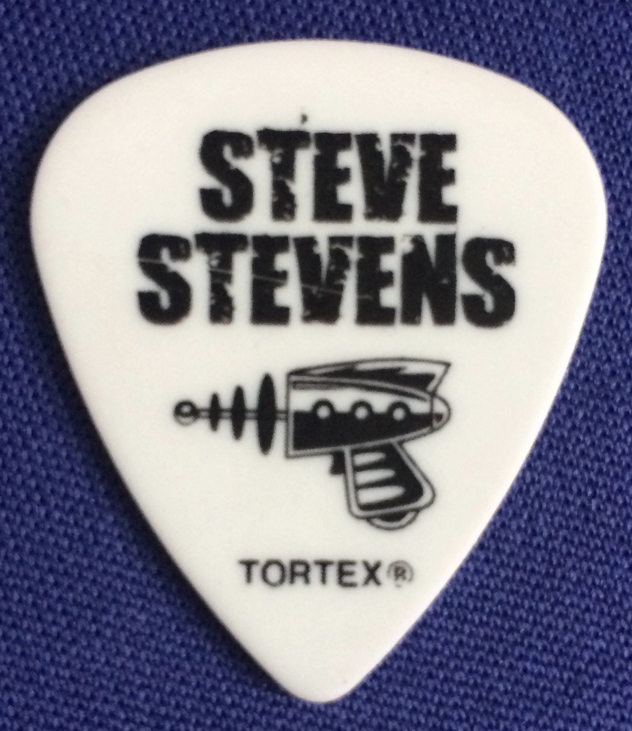 Plektrum des Gitarristen Steve Stevens